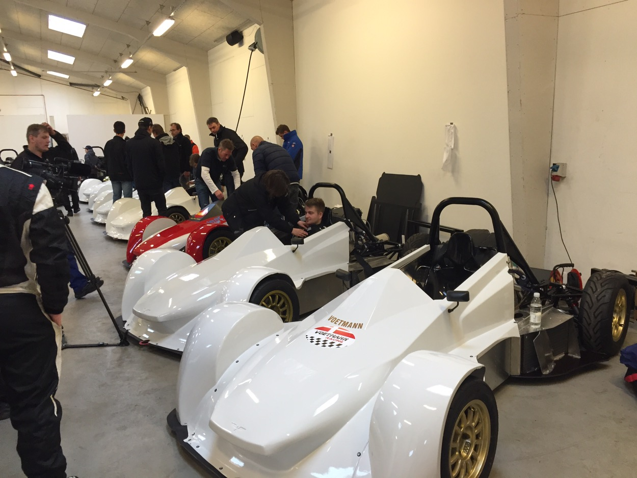 Aquila Synergy-biler der benyttes i FDM Sport-serien. Her fra de første team-test på Jyllandsringen. Nærmest ses bilen fra Team Voetmann Racing.